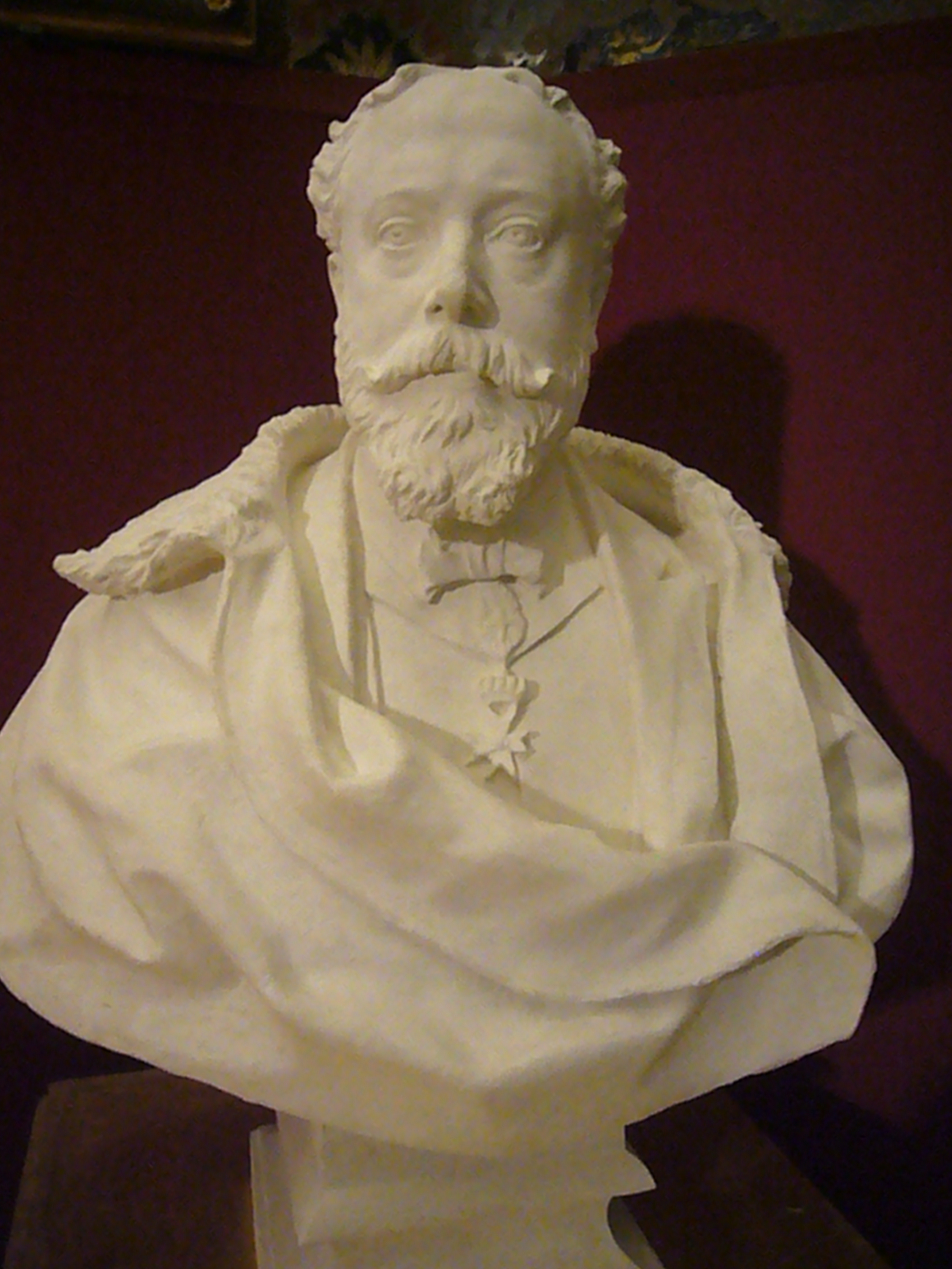 Roma, palazzo Brancaccio, busto del principe Salvatore Brancaccio (Gai 1909)